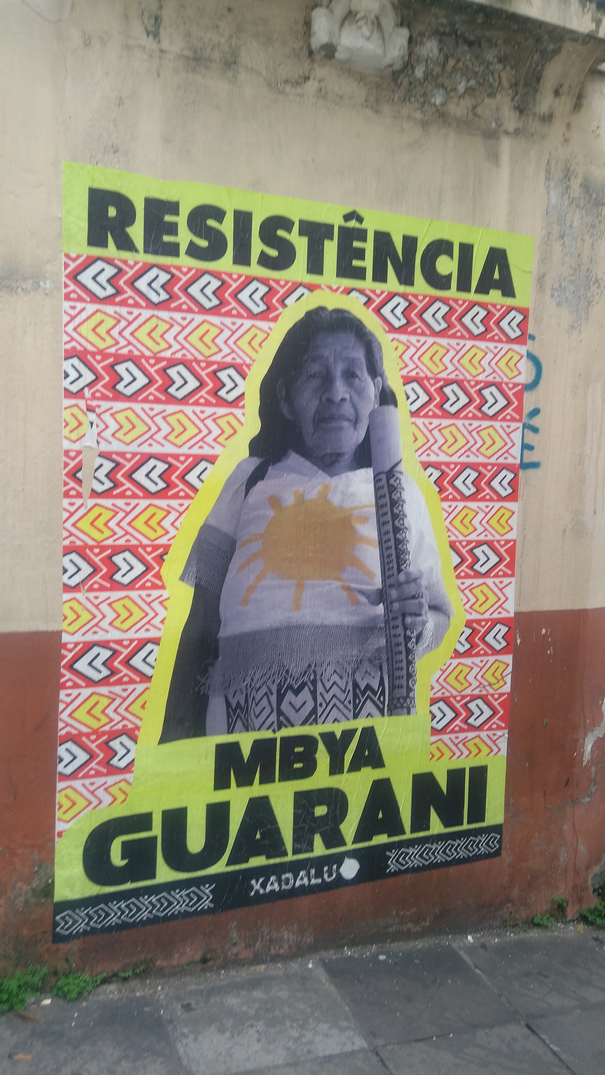 Resistência Mbya Guarani Xadalu (Porto Alegre, Brasil)